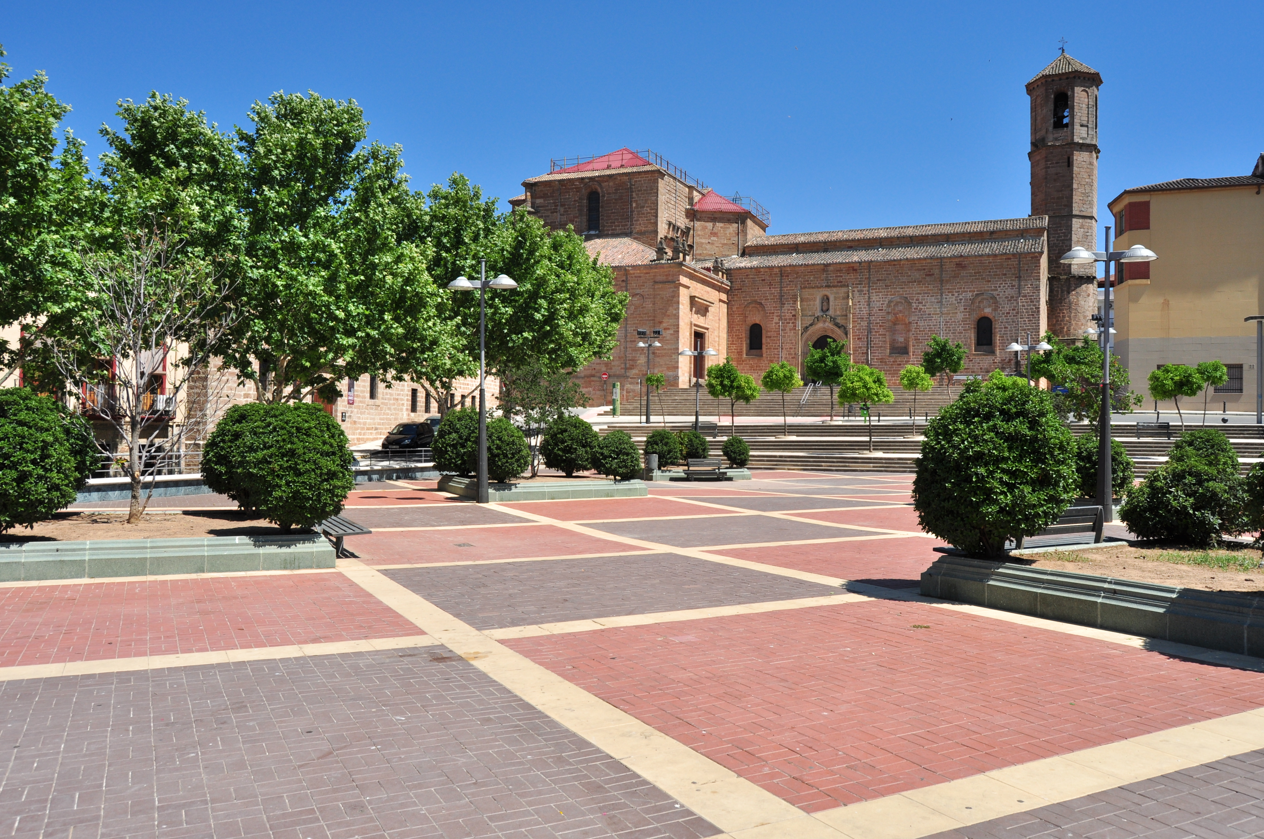 Linares - 010